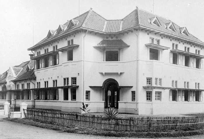 Repro Negatif. Sekolah Dasar Hindia-Belanda untuk siswi perempuan "Kartinischool" (Sekolah Kartini) di Bogor, Jawa.